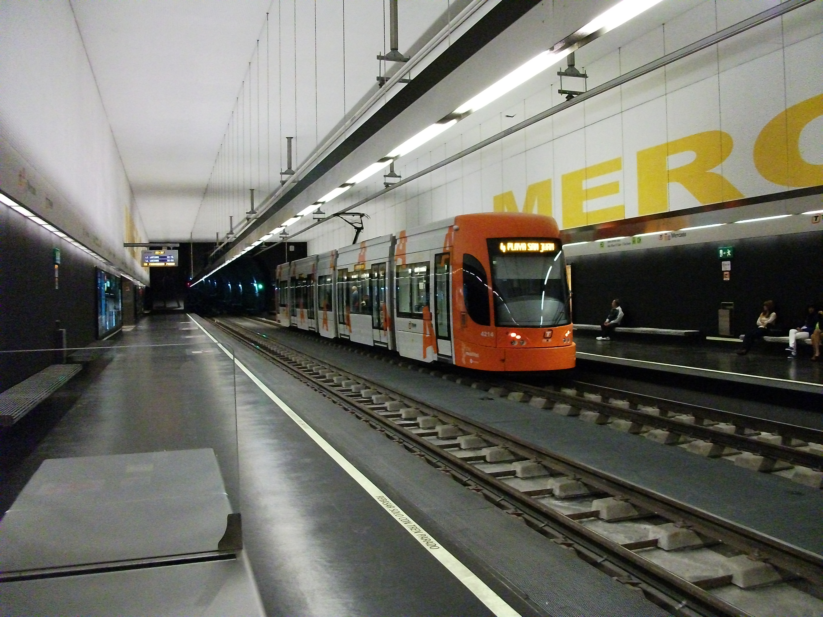 Estacion de "Mercado Central", junto al centro historico de Alicante.